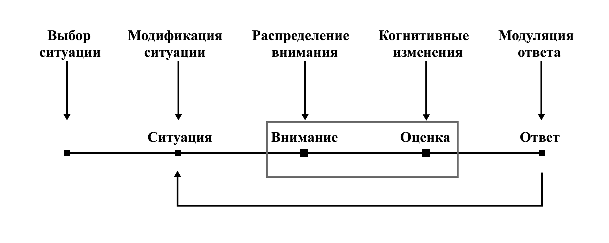 Пять классов стратегий регуляций эмоций: выбор ситуации, модификация ситуации, распределение внимания, когнитивные изменения, модуляция ответа.